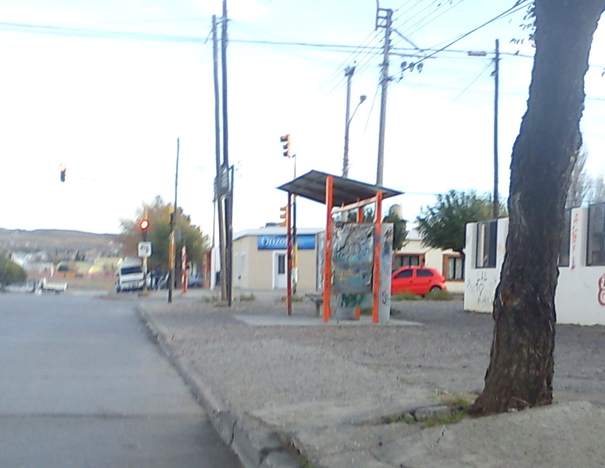 Parada de Autobuses Caleta Olivia